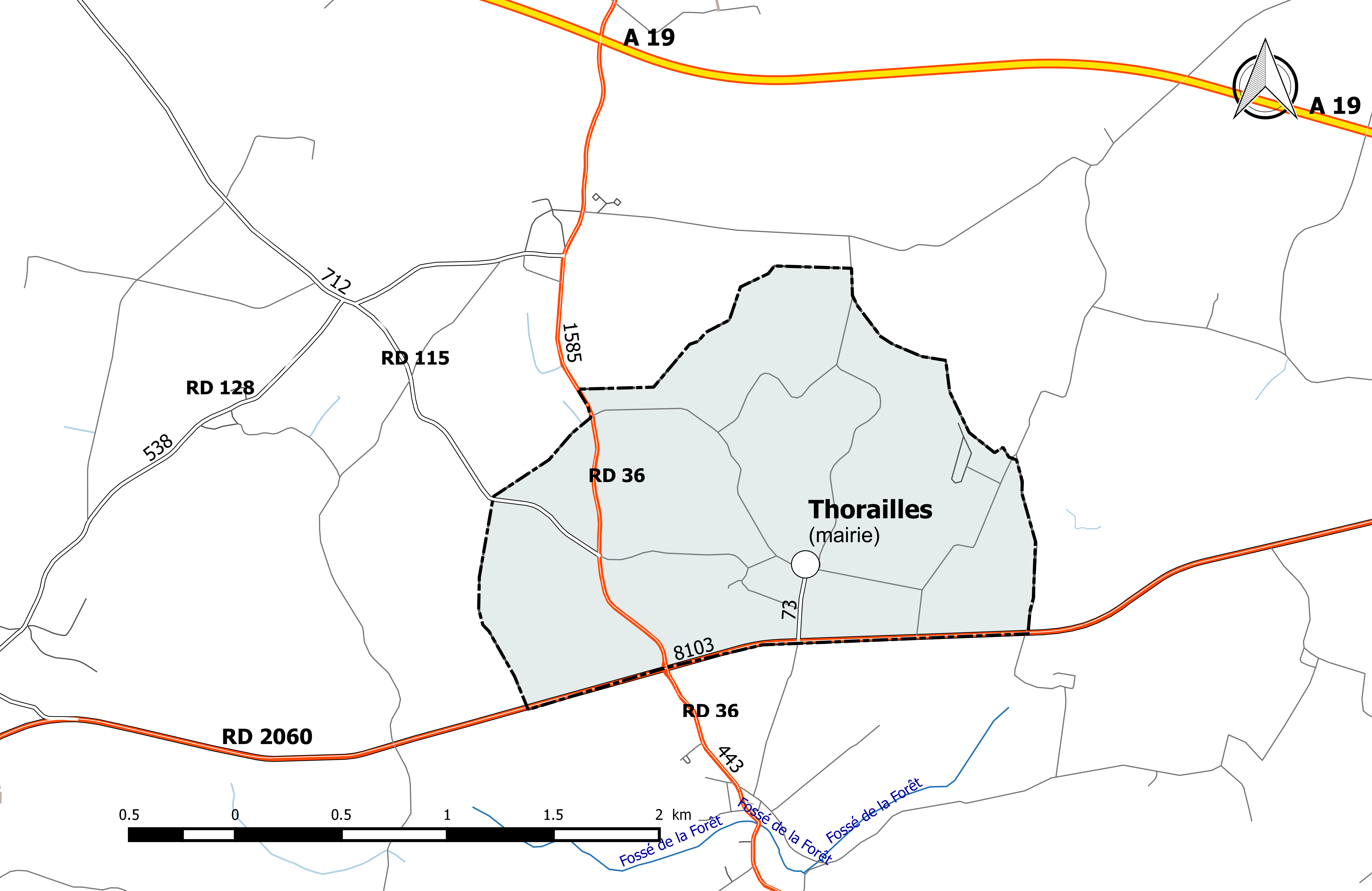 Carte du réseau routier de la commune de Thorailles.